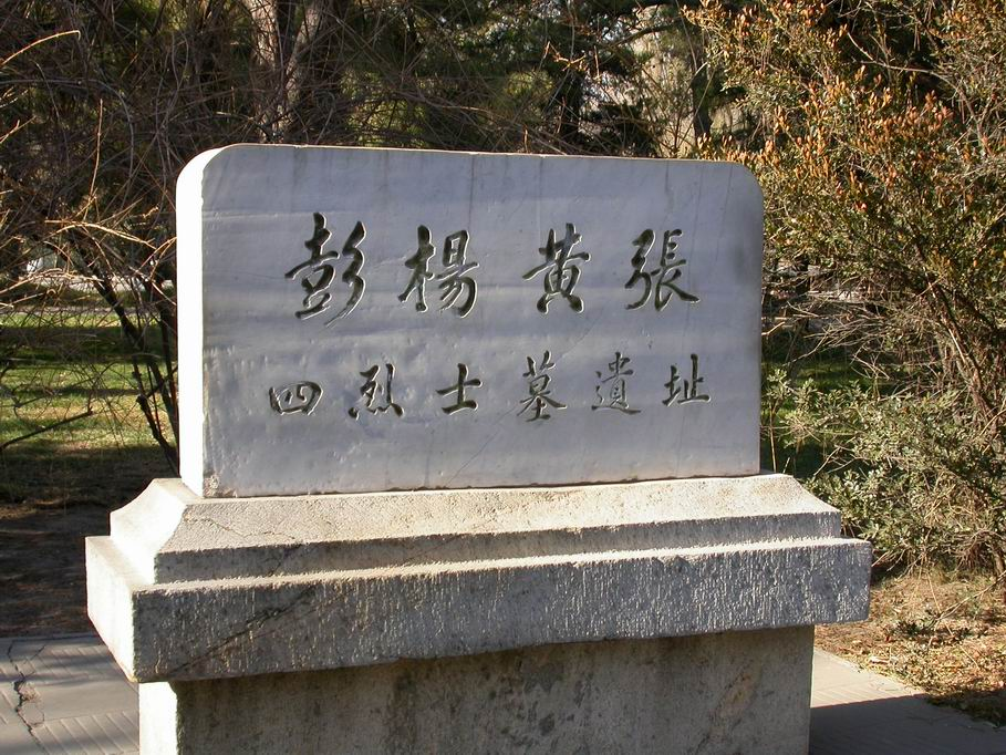 北京动物园内，彭家珍、杨禹昌、黄芝荫、张先培四烈士墓遗址碑（自拍）。本图片不允许百度百科使用。